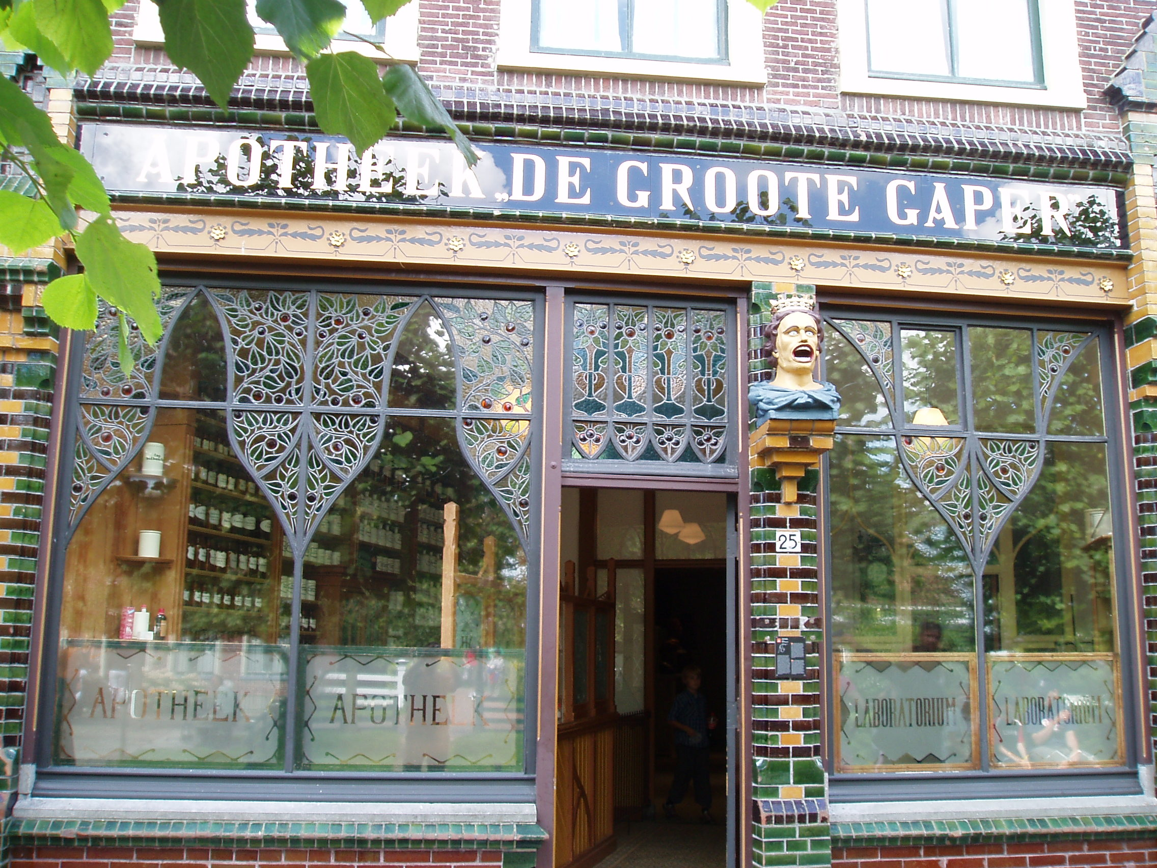 Zuiderzeemuseum in town Enkhuizen, the Netherlands